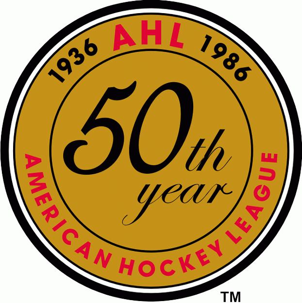 Logo der American Hockey League zum 50. Jahresjubiläum (Saison 1985/86)